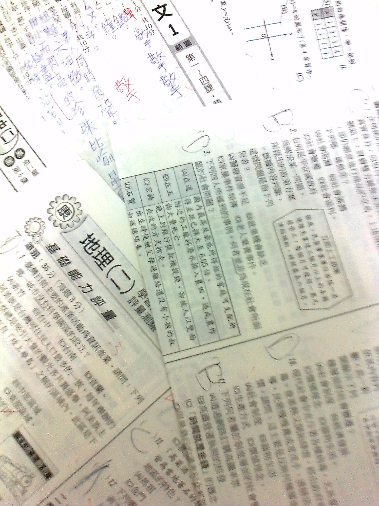 國中生的考卷